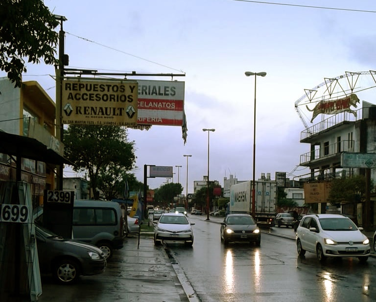 Avenida San Martin, una de las arterias principales de la localidad de Villa Gobernador Gálvez